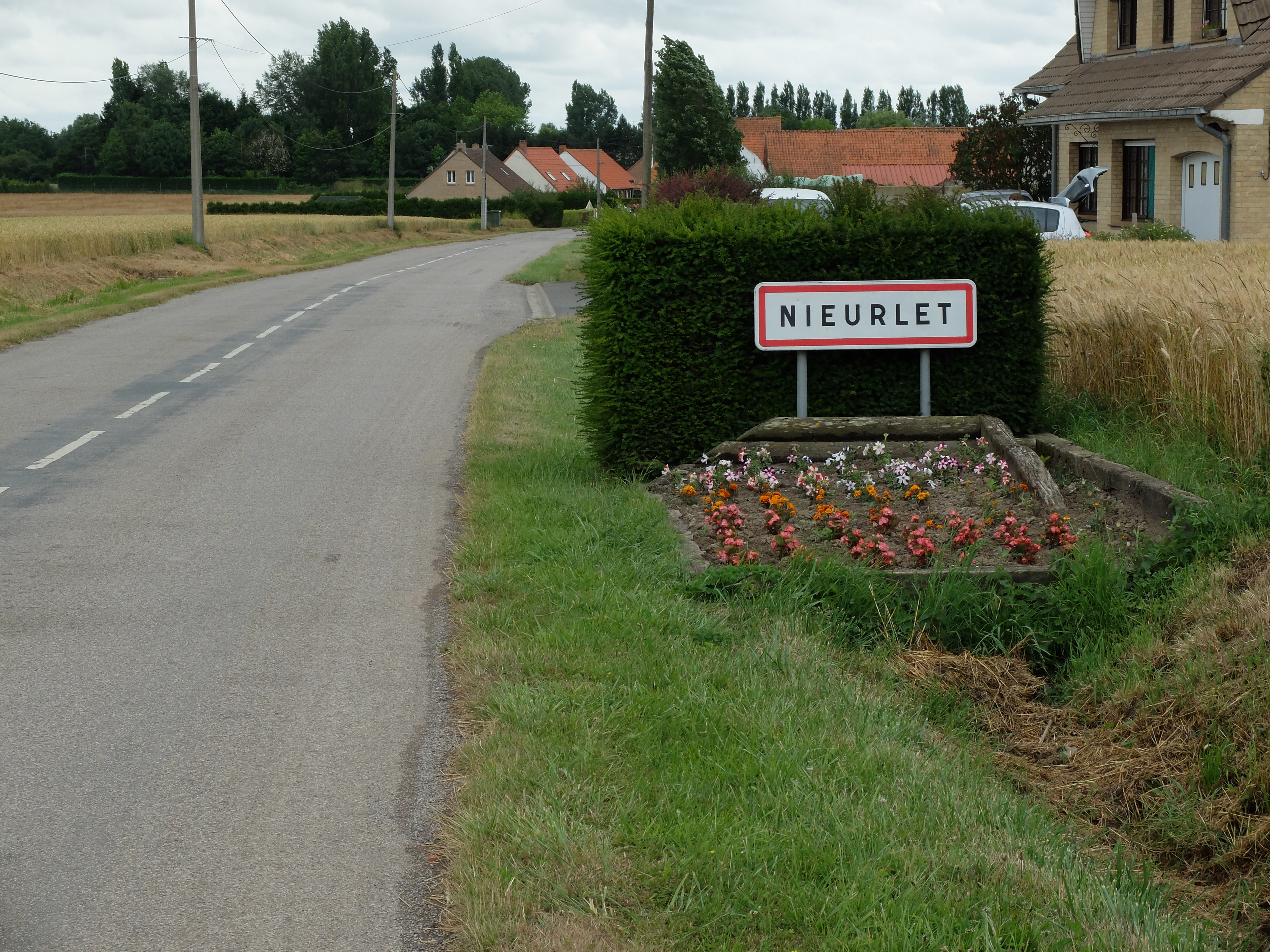 Vue d'une entrée de la commune de Nieurlet.